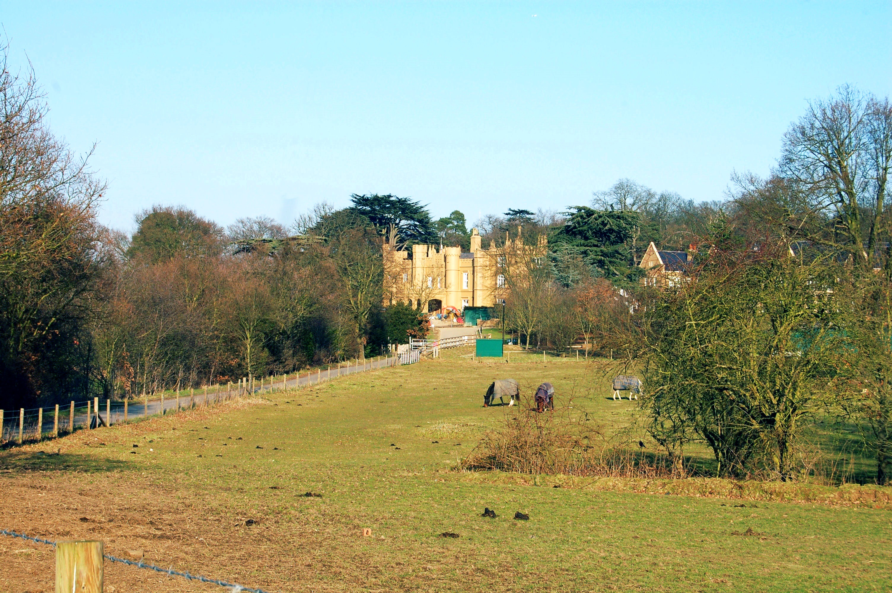 wall hall